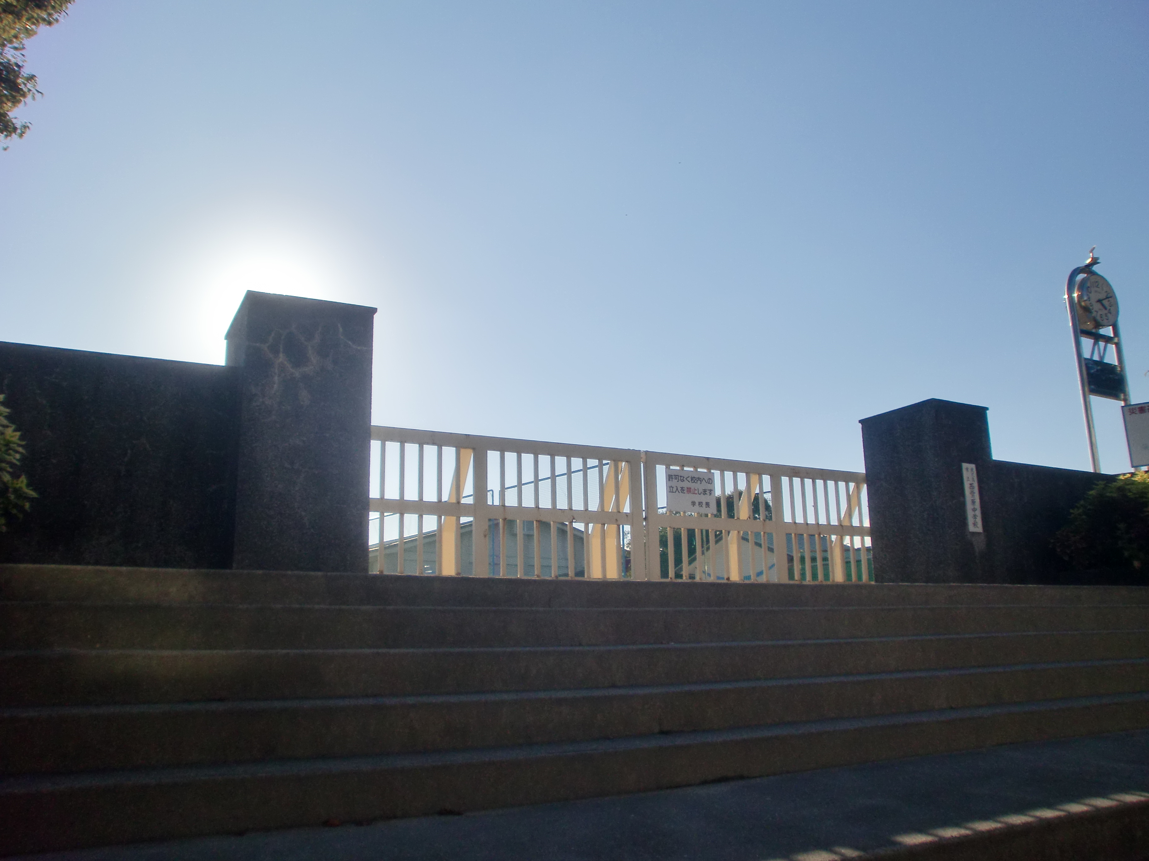 鹿児島市立西紫原中学校の外観。